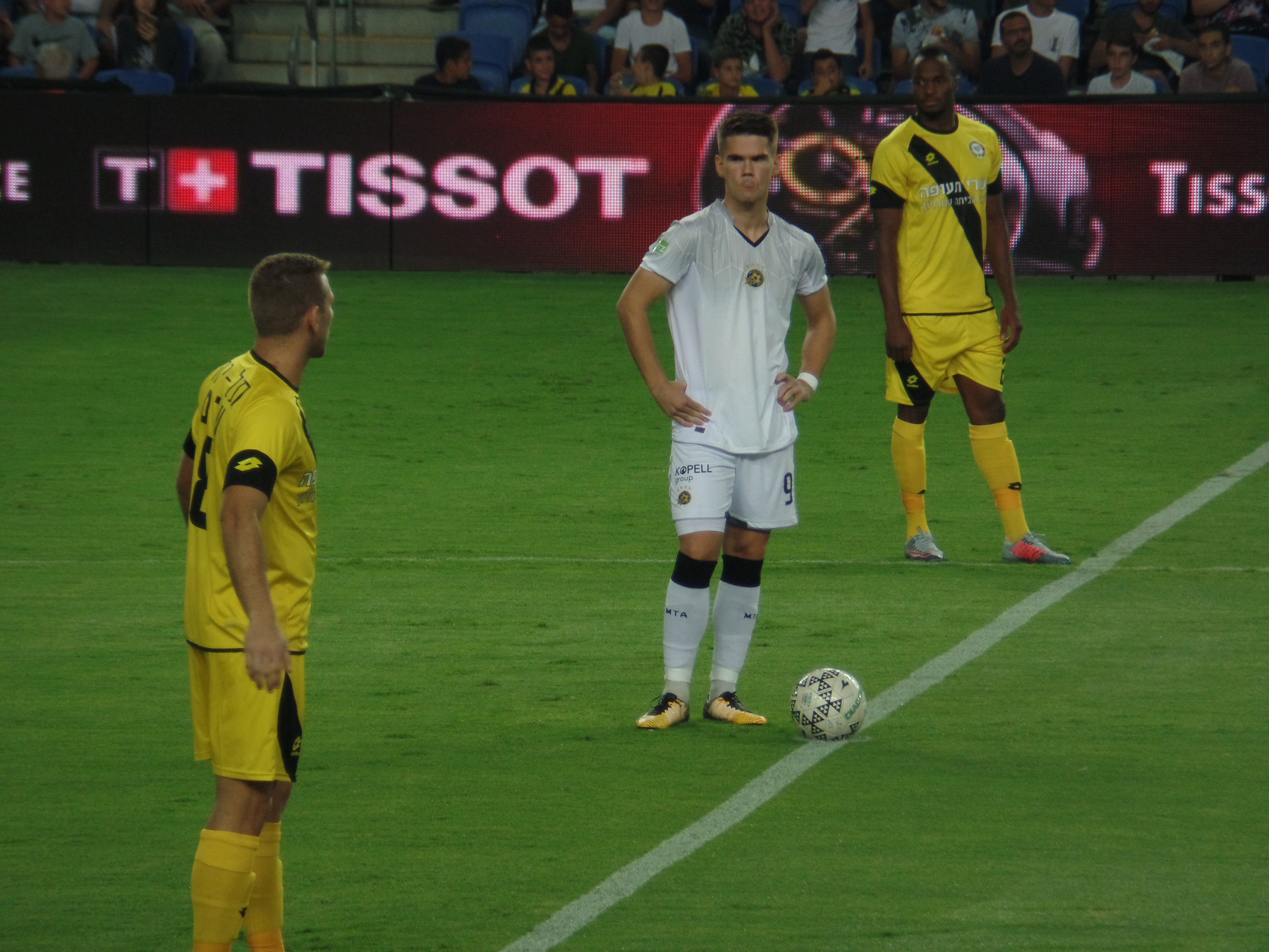 וידאר ארן קיארטאנסון וידאר קיארטאנסון במדי מכבי ת"א